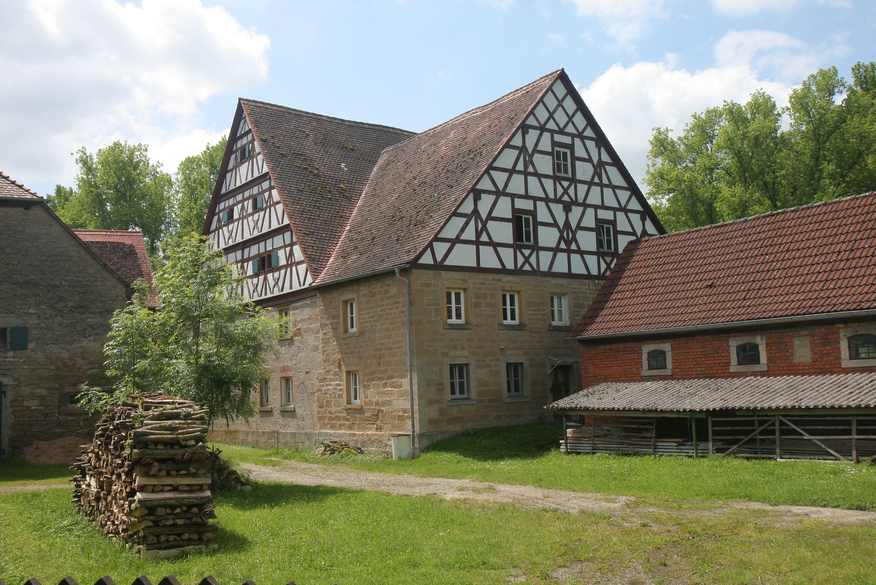 Dorfmühle (Fachwerkgiebel, im Kern 16. Jahrhundert, umgebaut 1899), Detwang 30, Rothenburg ob der Tauber-Detwang.